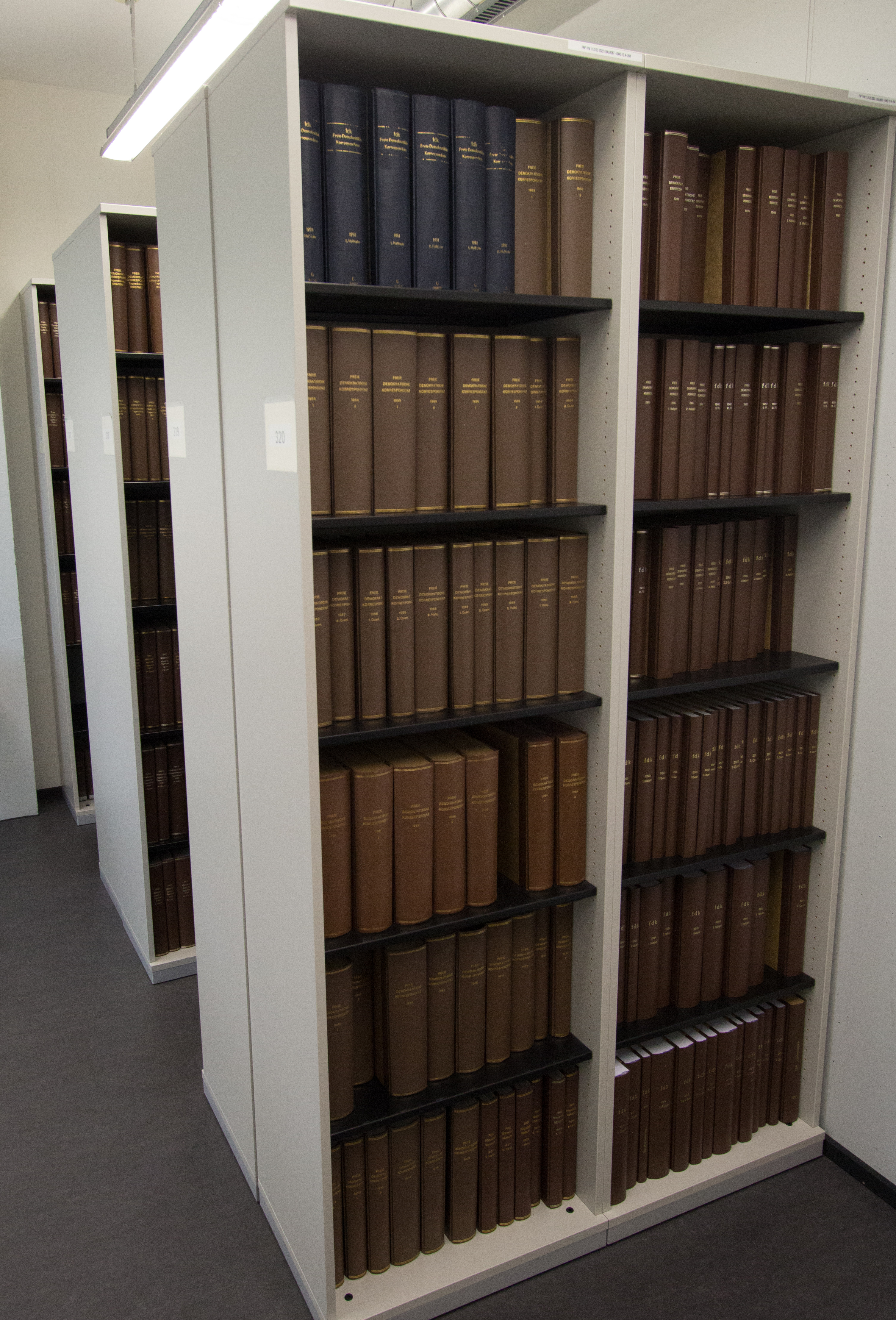 Archiv des Liberalismus in Gummersbach